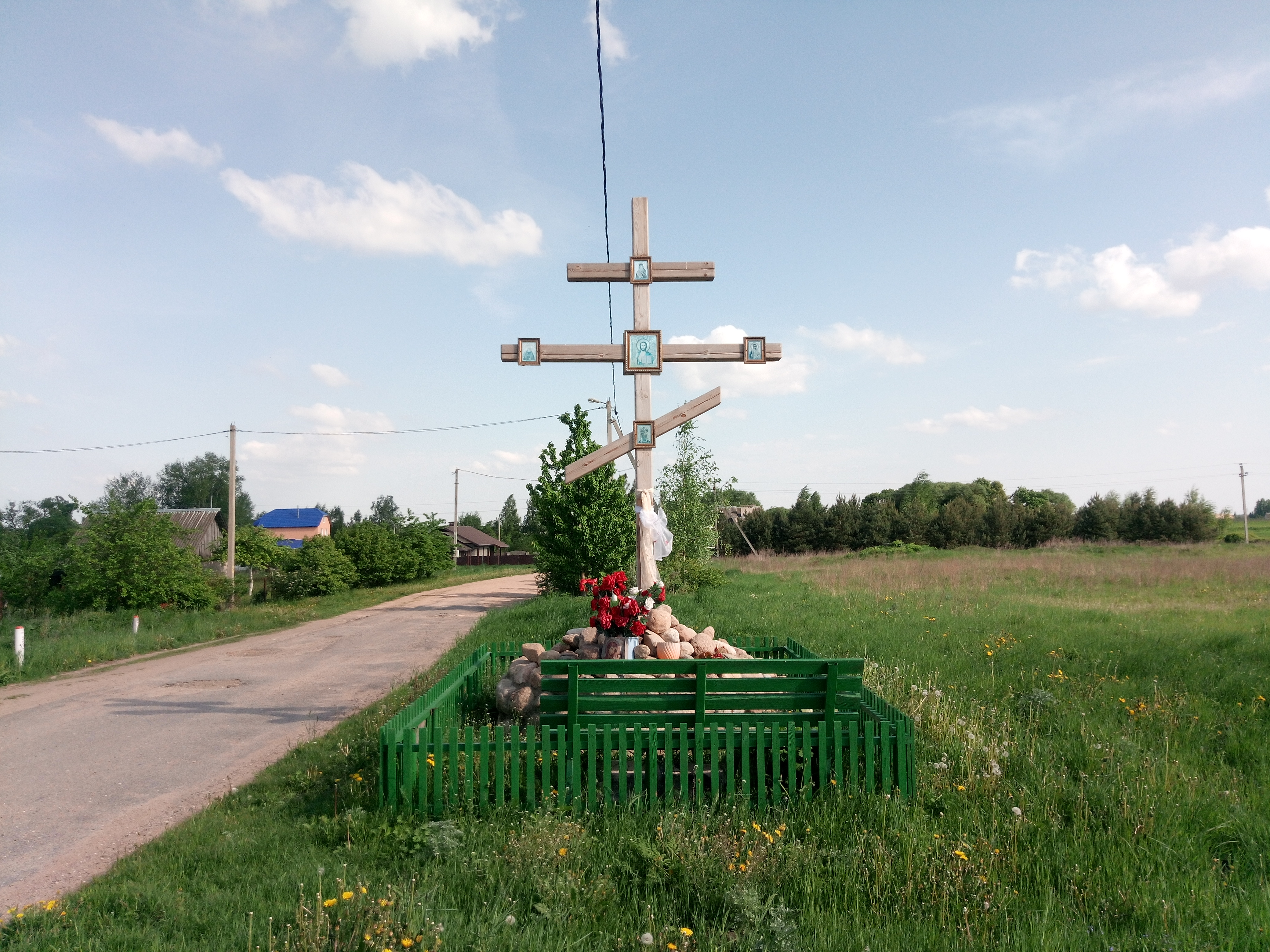 Крыж.